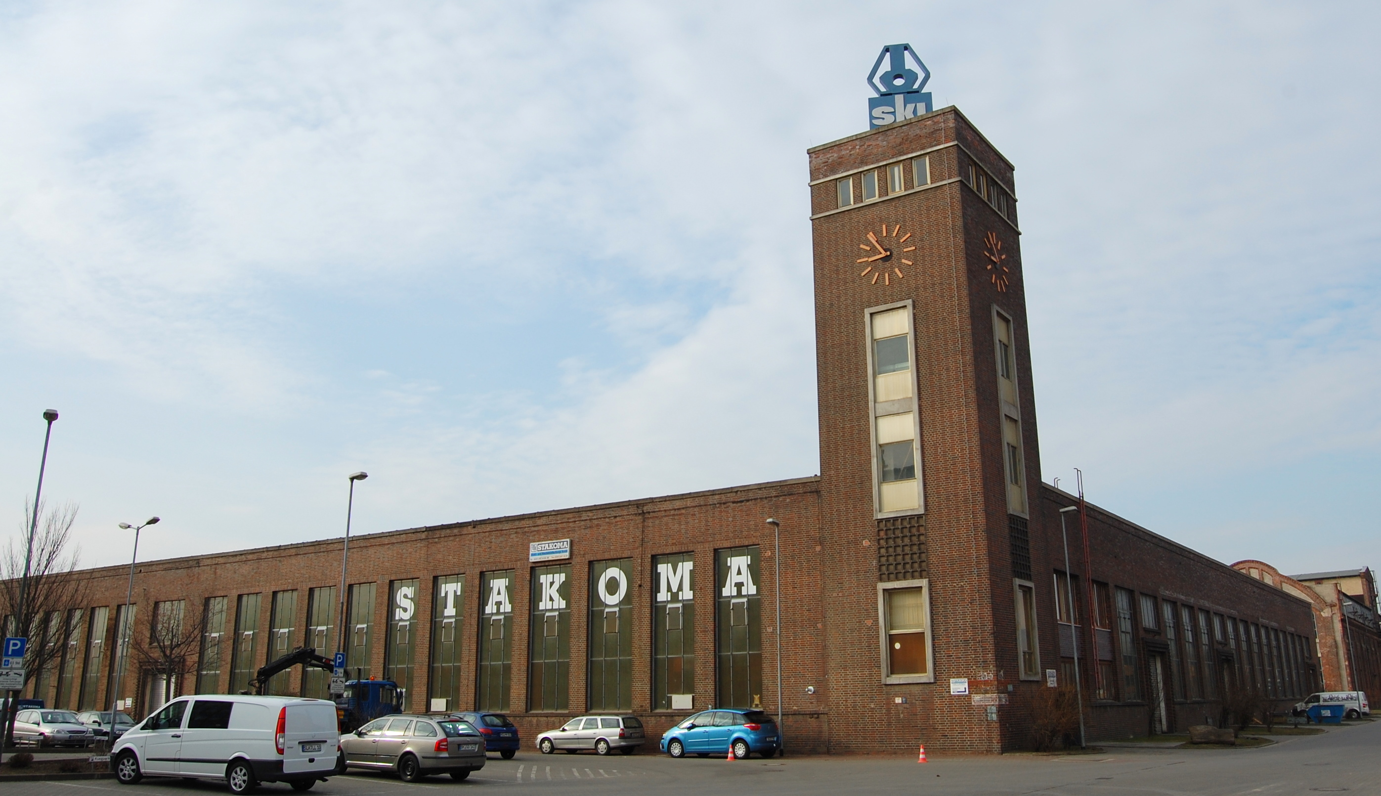 Rohrschlangenbau mit Uhrenturm auf dem SKL-Gelände in Magdeburg-Salbke